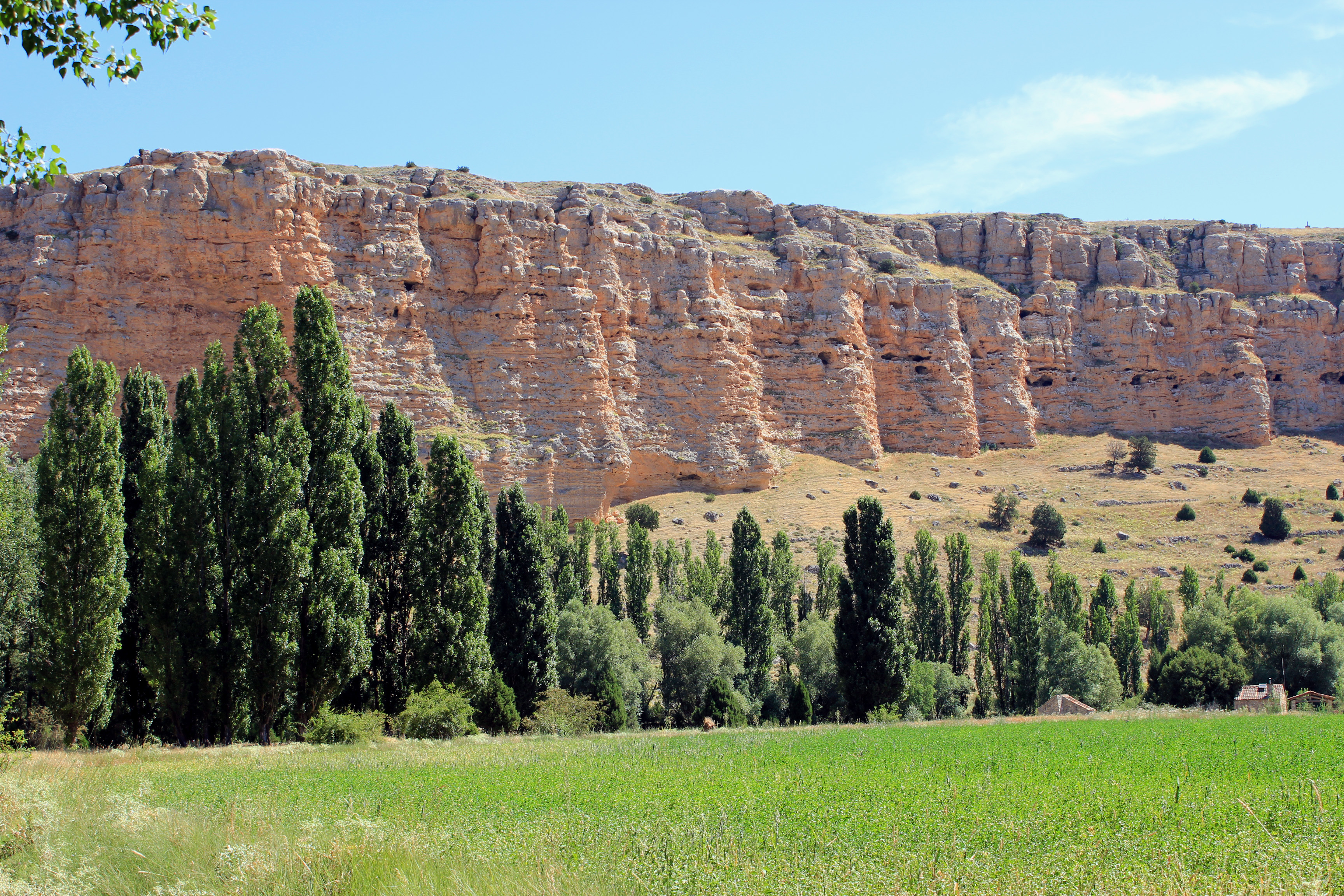 Hoces del río Riaza This is a photography of a Special Area of Conservation in Spain with the ID: ES4160104. Natura2000 entry, EEA entry